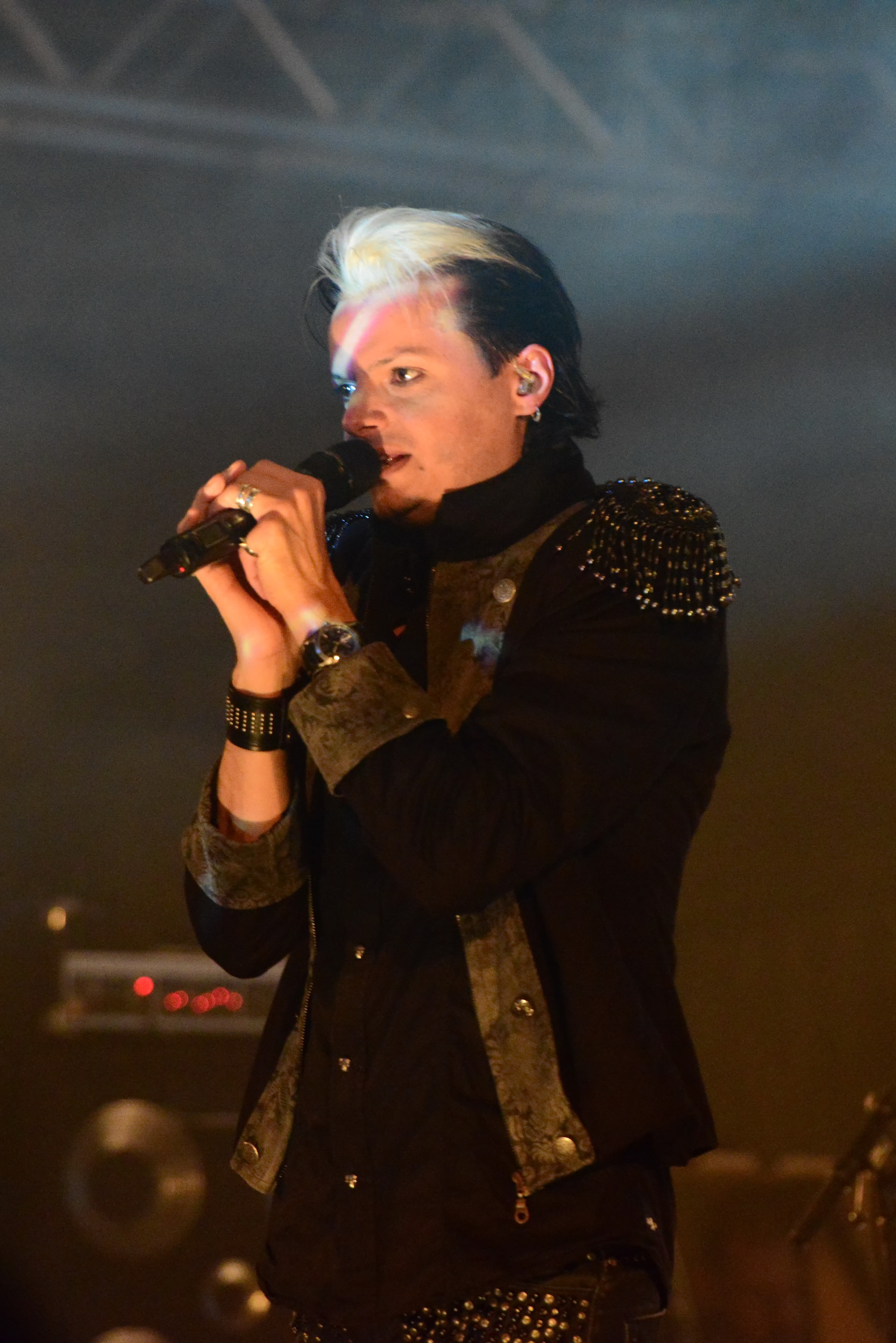 Lacrimosa, Amphi festival 2014